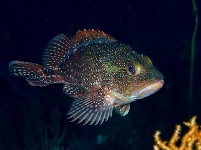 ウッカリカサゴ Sebastiscus tertius